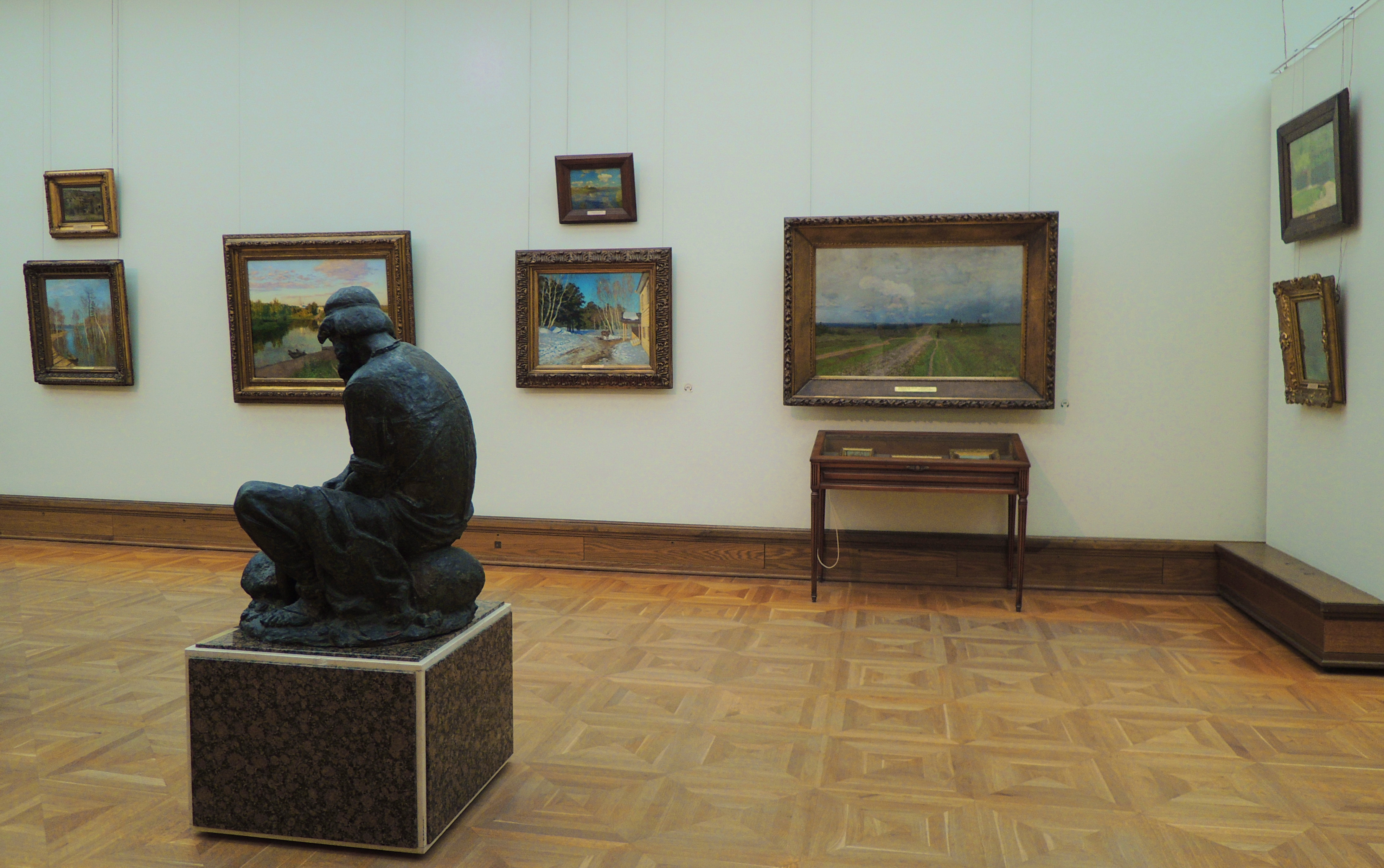 Hall N36 Tretyakov gallery - Levitan 01 by shakko